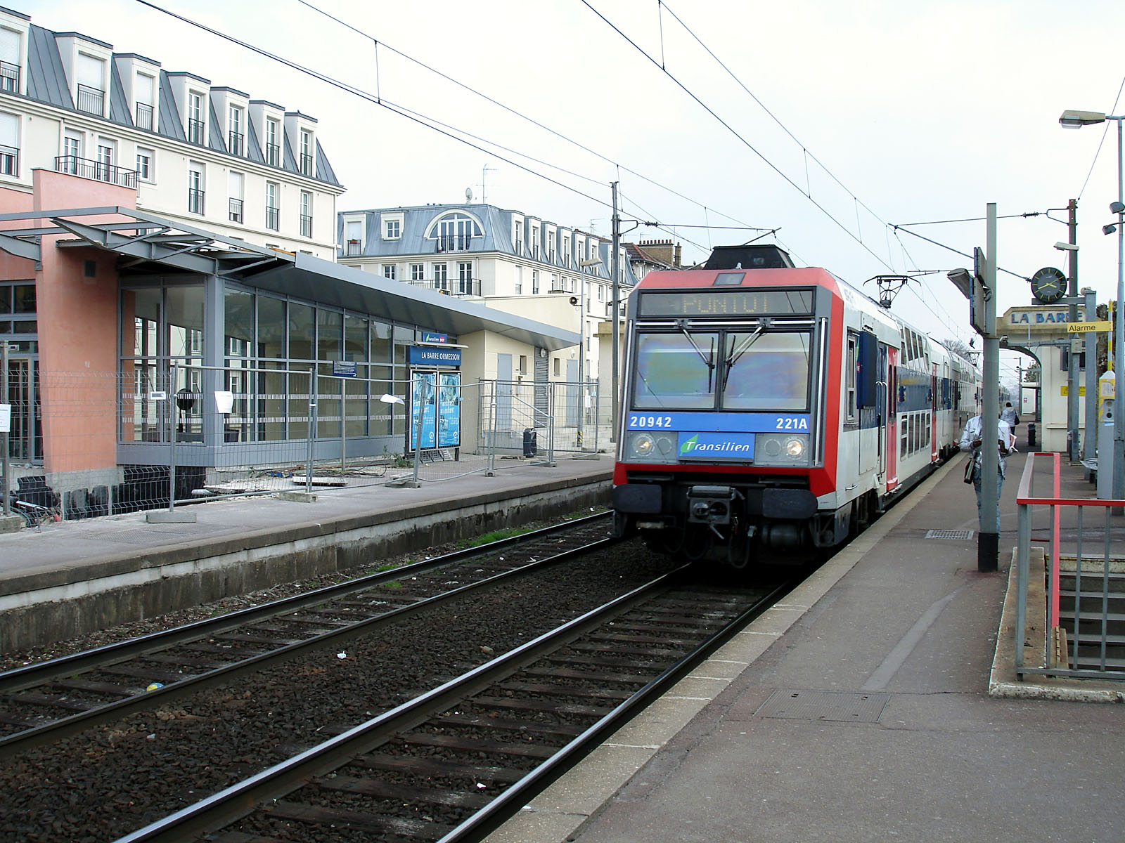 Rame Z 20900 en direction de Pontoise entrant en gare de La Barre - Ormesson, à Deuil-la-Barre, Val-d'Oise, France.